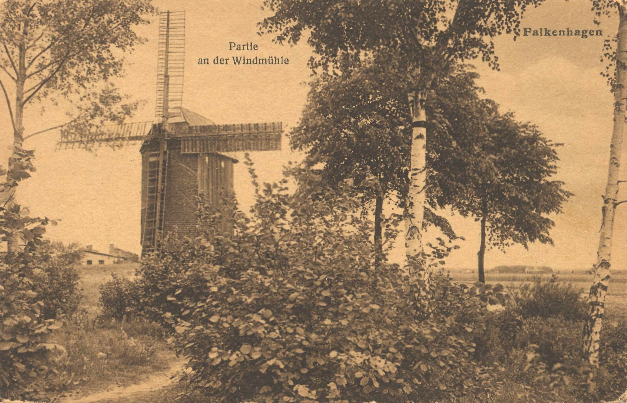 Historische AK um 1900 aus Falkenhagen mit Windmühle